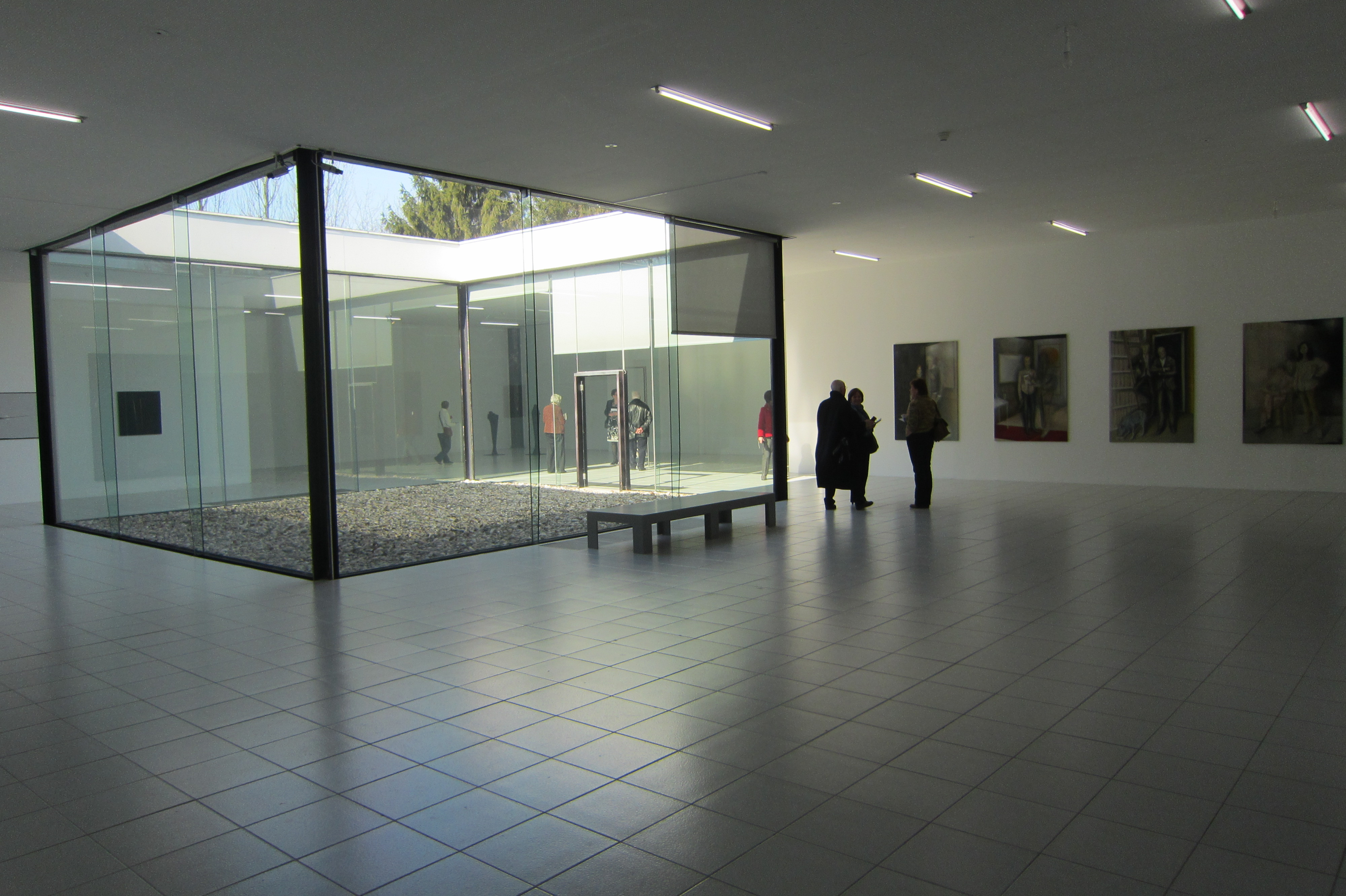 Interieur Museum Dhondt-Dhaenens, Deurle, België